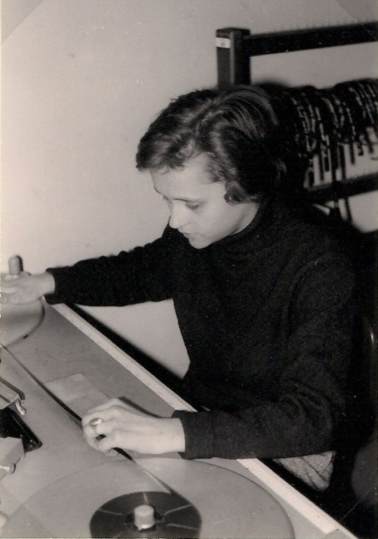 Barbara Hennings am Filmschneidetisch, 1965 bei der Tagesschau (ARD)